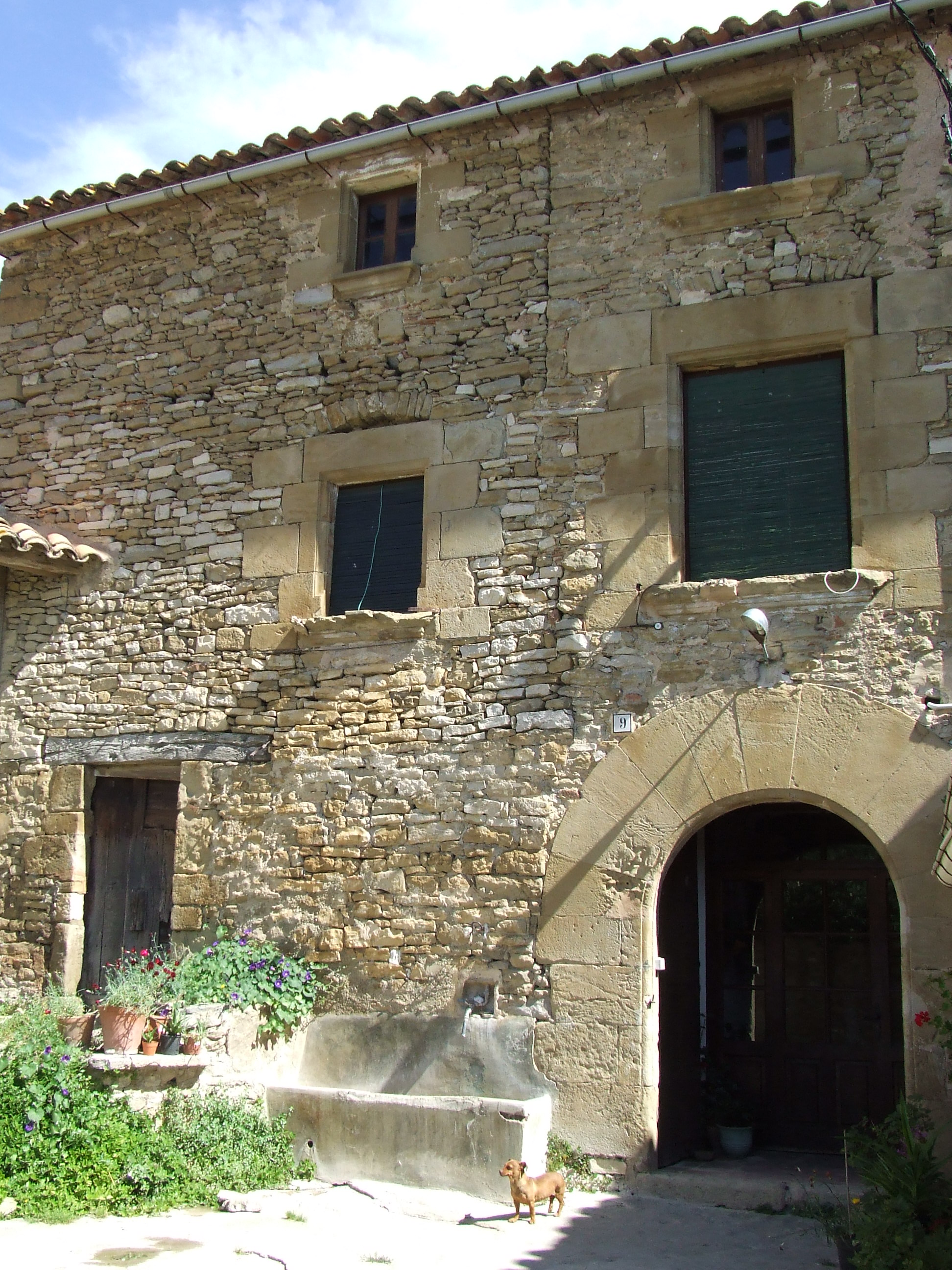 El Prat (Castellcir, Moianès)